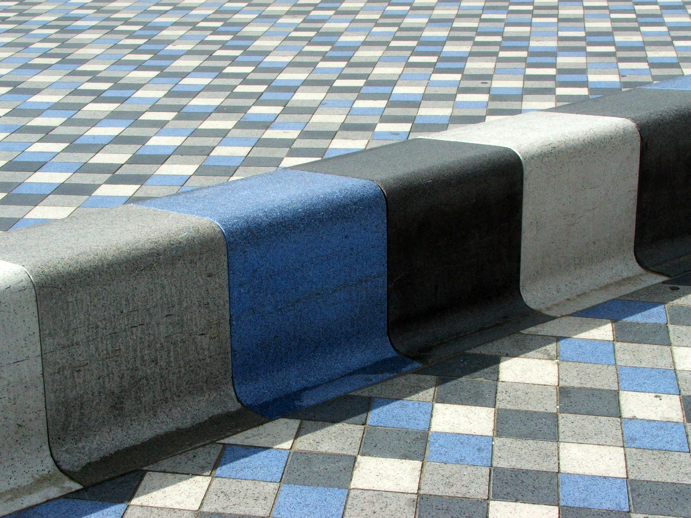 Knokke tiles in blue and grey